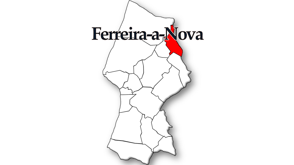 População